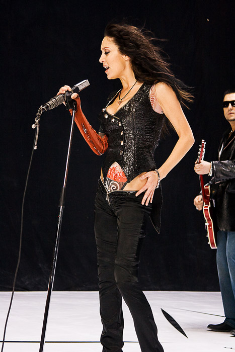 Alеna Vinnitskaya - a Ukrainian singer (ex-Nu Virgos)